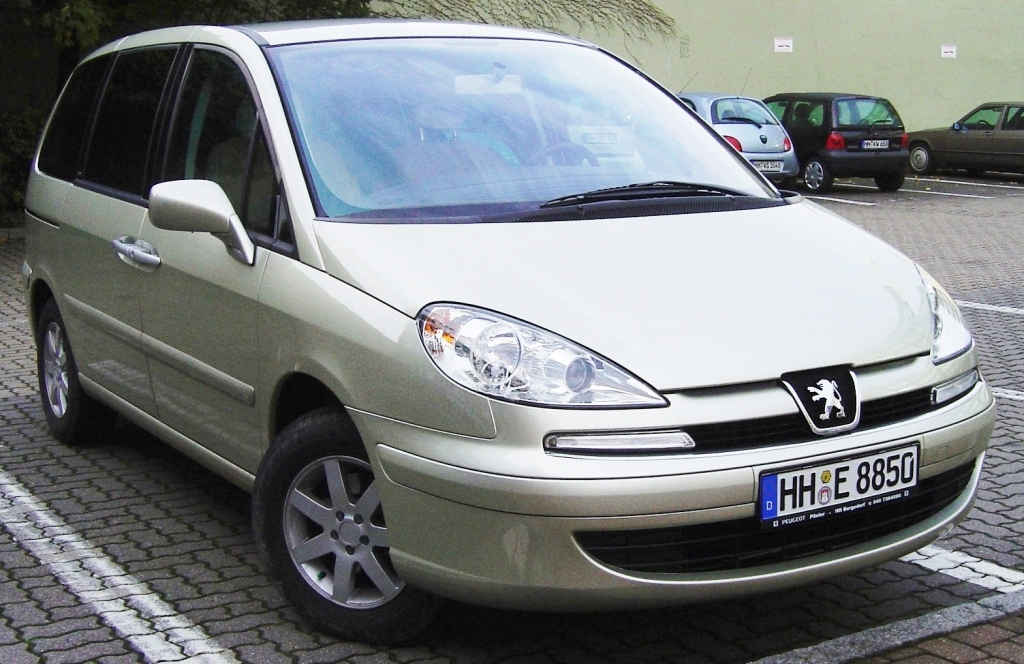 Peugeot 807, Baujahr 2006, Erstzulassung 07/2006 Foto von User:Ile-de-re erstellt am 06.11.2006